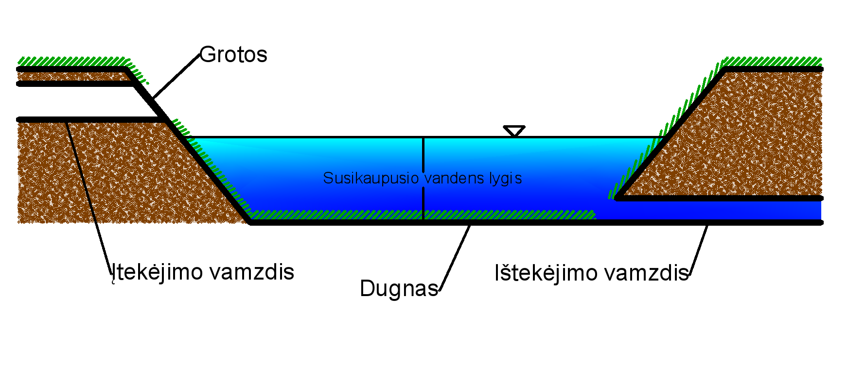 Išleidžiamojo paviršinių nuotekų tvenkinio schema